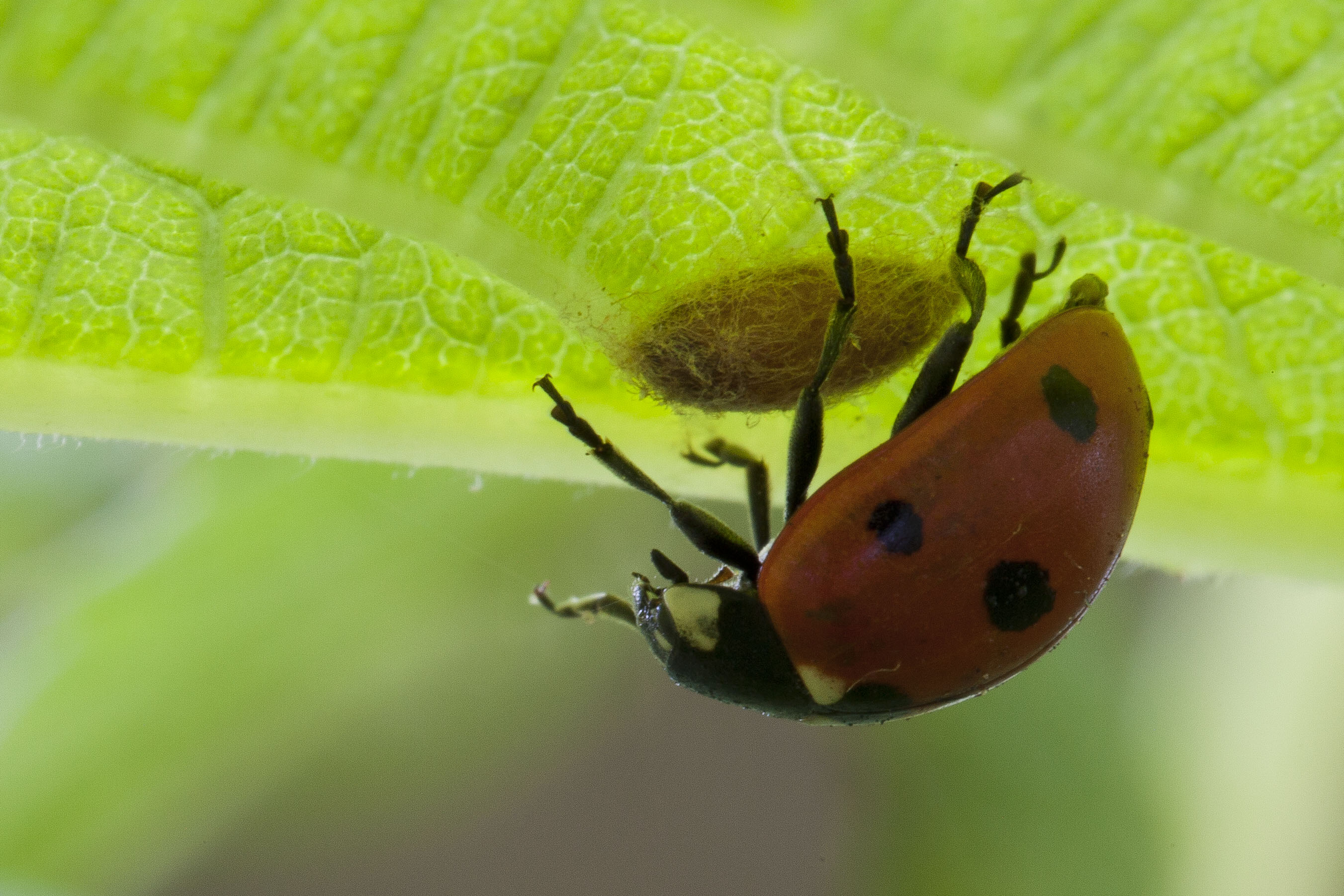 Eine Brackwespenpuppe unter einem Marienkäfer. Beide hängen unter einem Himbeerblatt.